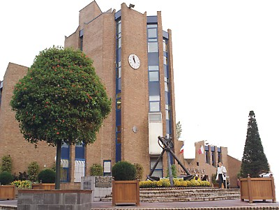 Mairie de Grande Synthe actuelle